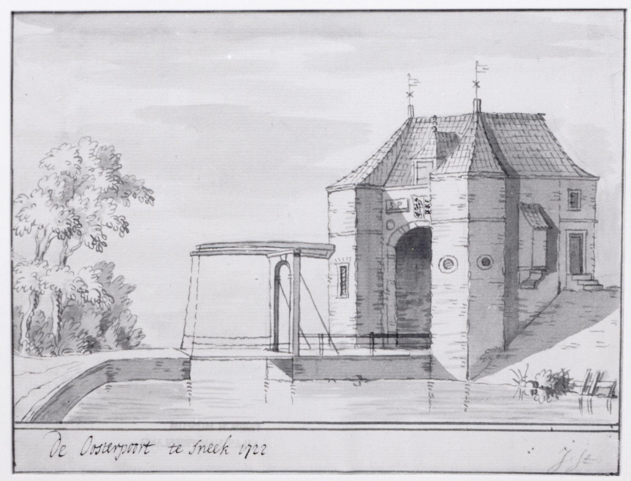 De voormalige Noorderpoort te Sneek in 1722.